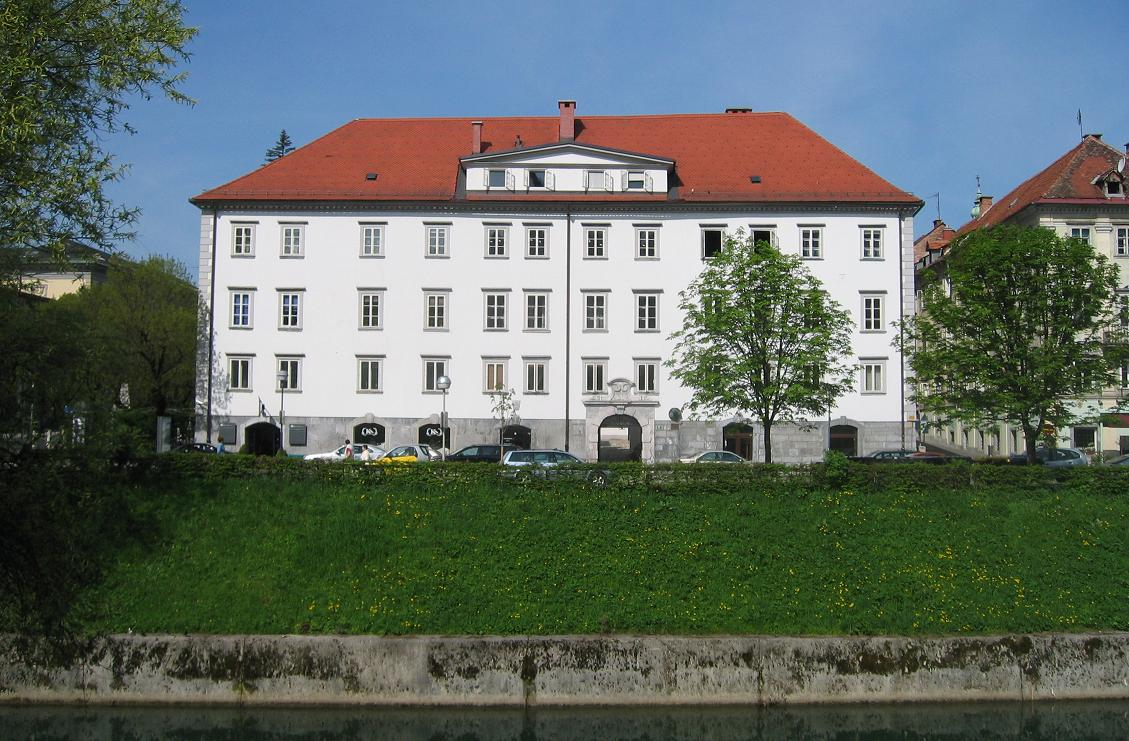 Žiga Zois palace, Ljubljana (in front the river Ljubljanica) author: Ziga 14:23, 25 April 2006 (UTC)